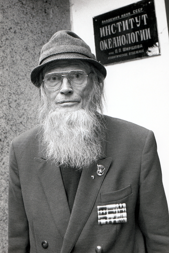 Runar Gåsström utanför Oceanografiska Institutet, Kaliningrad 1993.